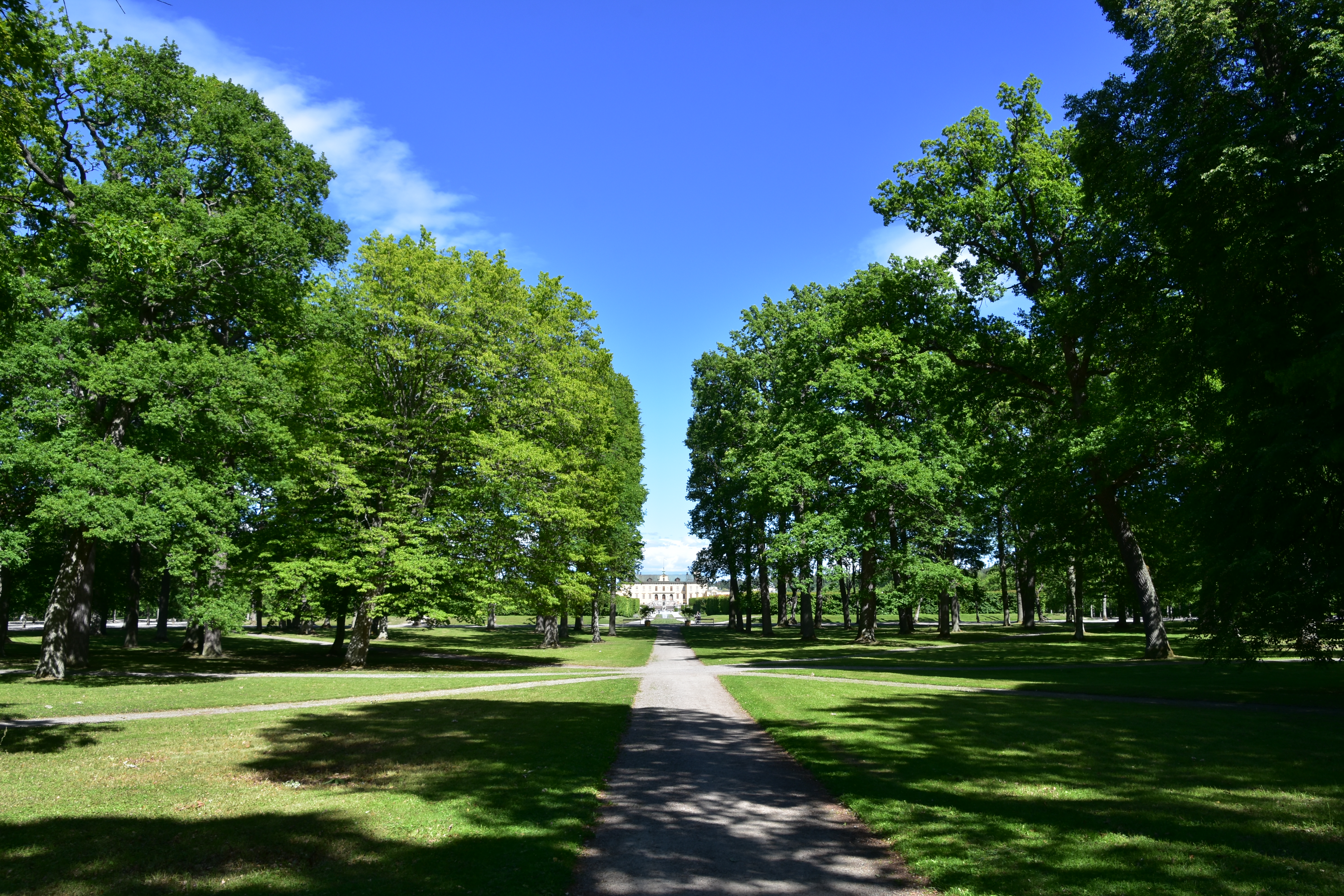 Drottningholm Palace park (15)